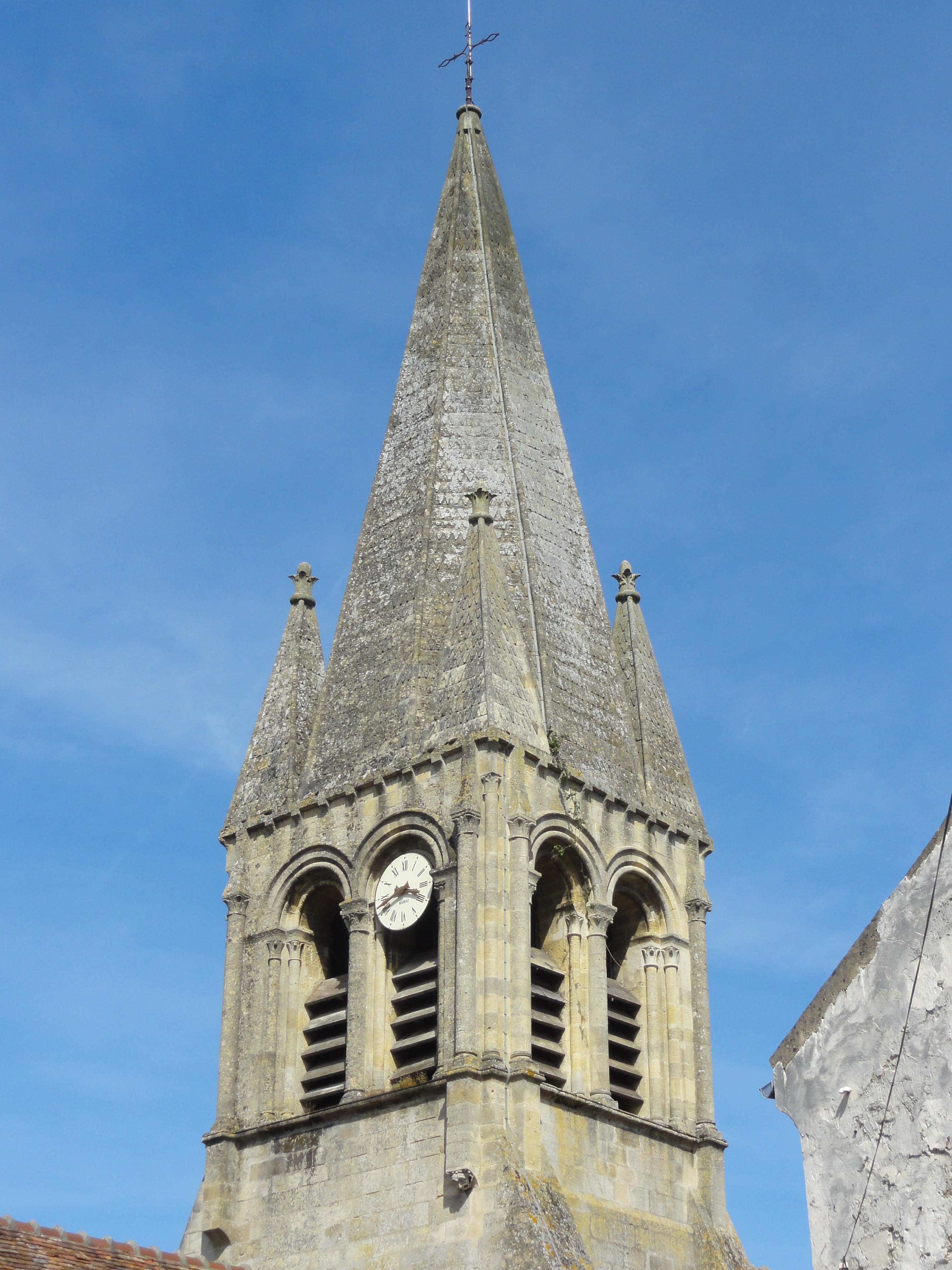 Église Saint-Germain-de-Paris de Hardricourt - voir titre.